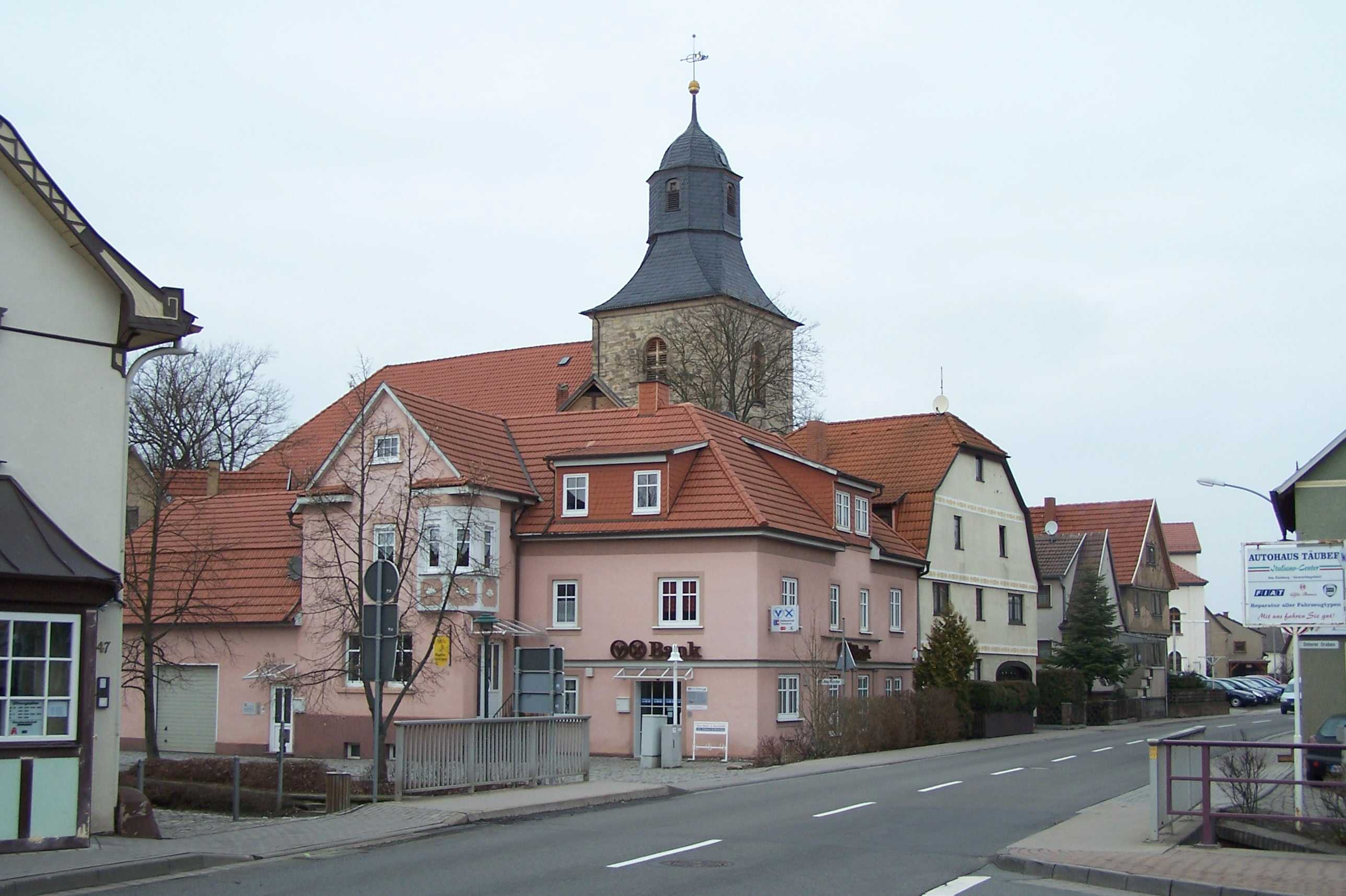 Barchfeld